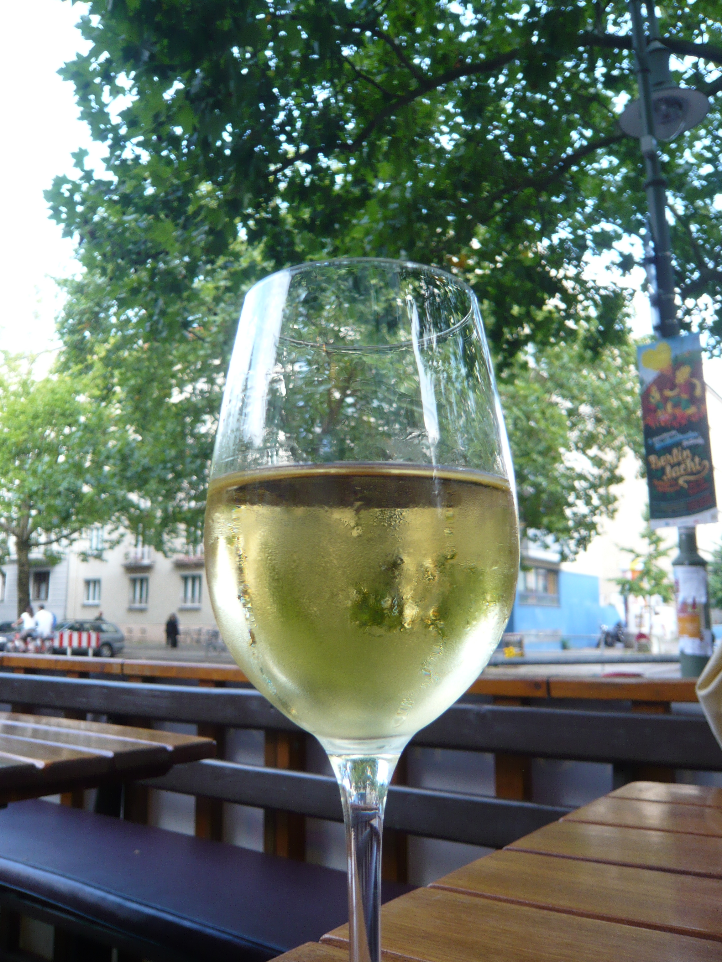 Gugelhopfe German Riesling